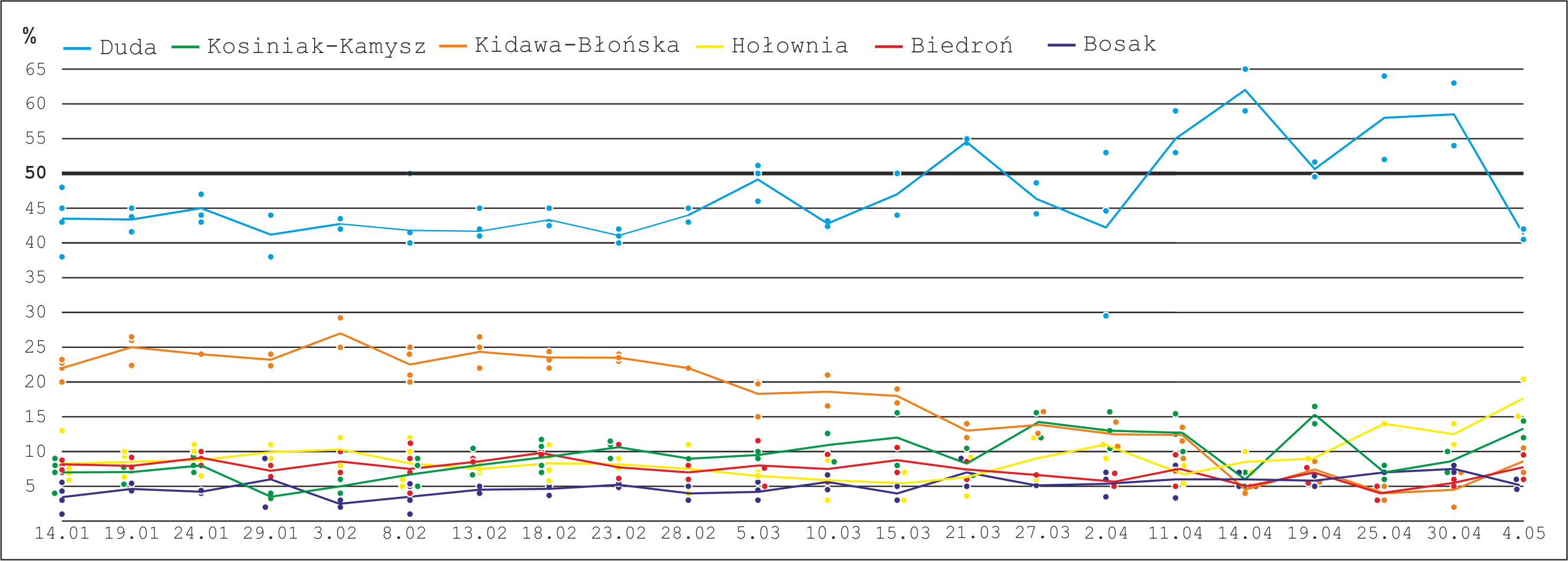 Wykres sondaży przed wyborami prezydenckimi 2020.